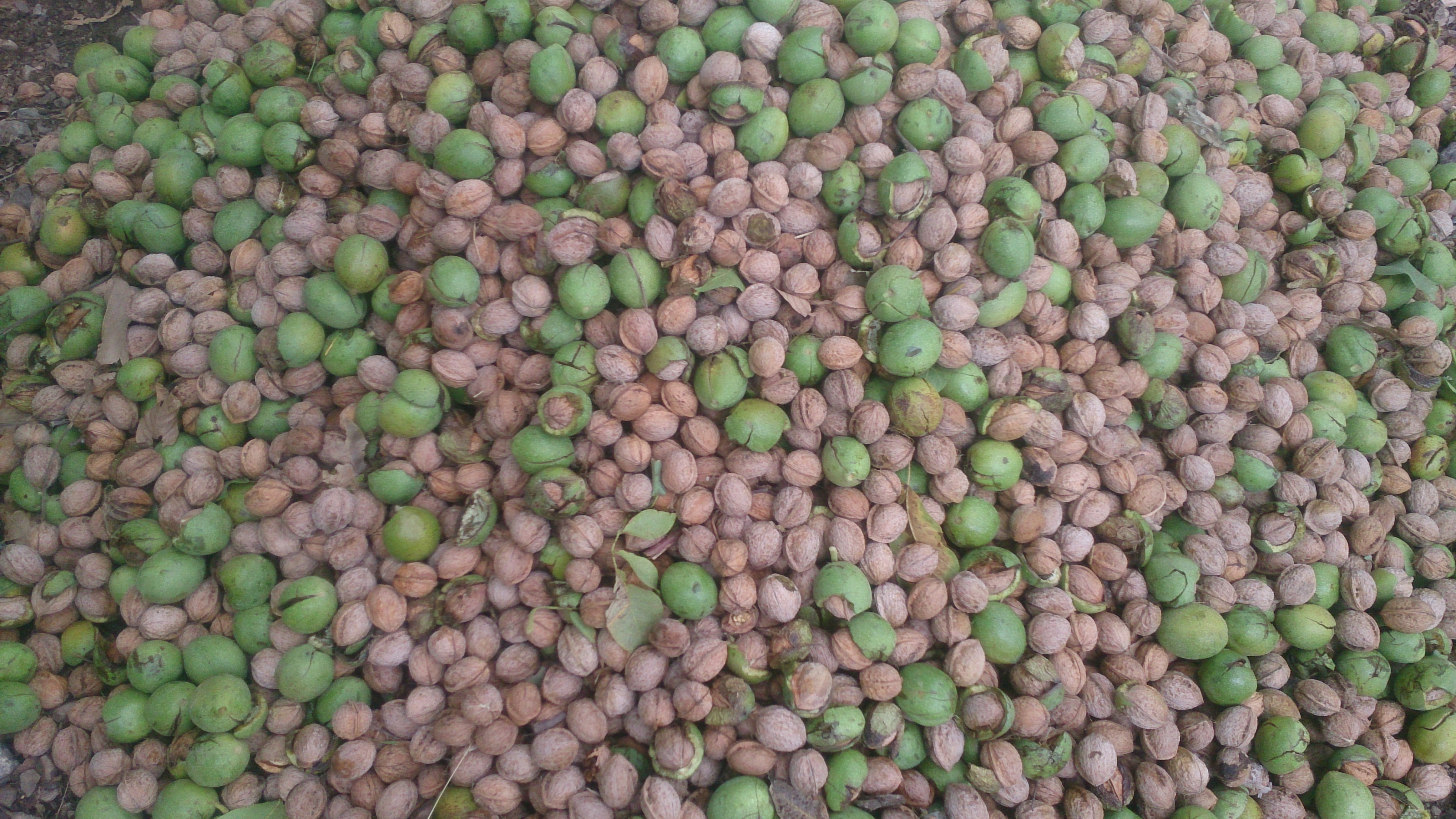 برداشت گردو (گردو تکانی) در روستای دامنه